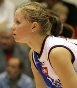 Paulina Maj, siatkarka